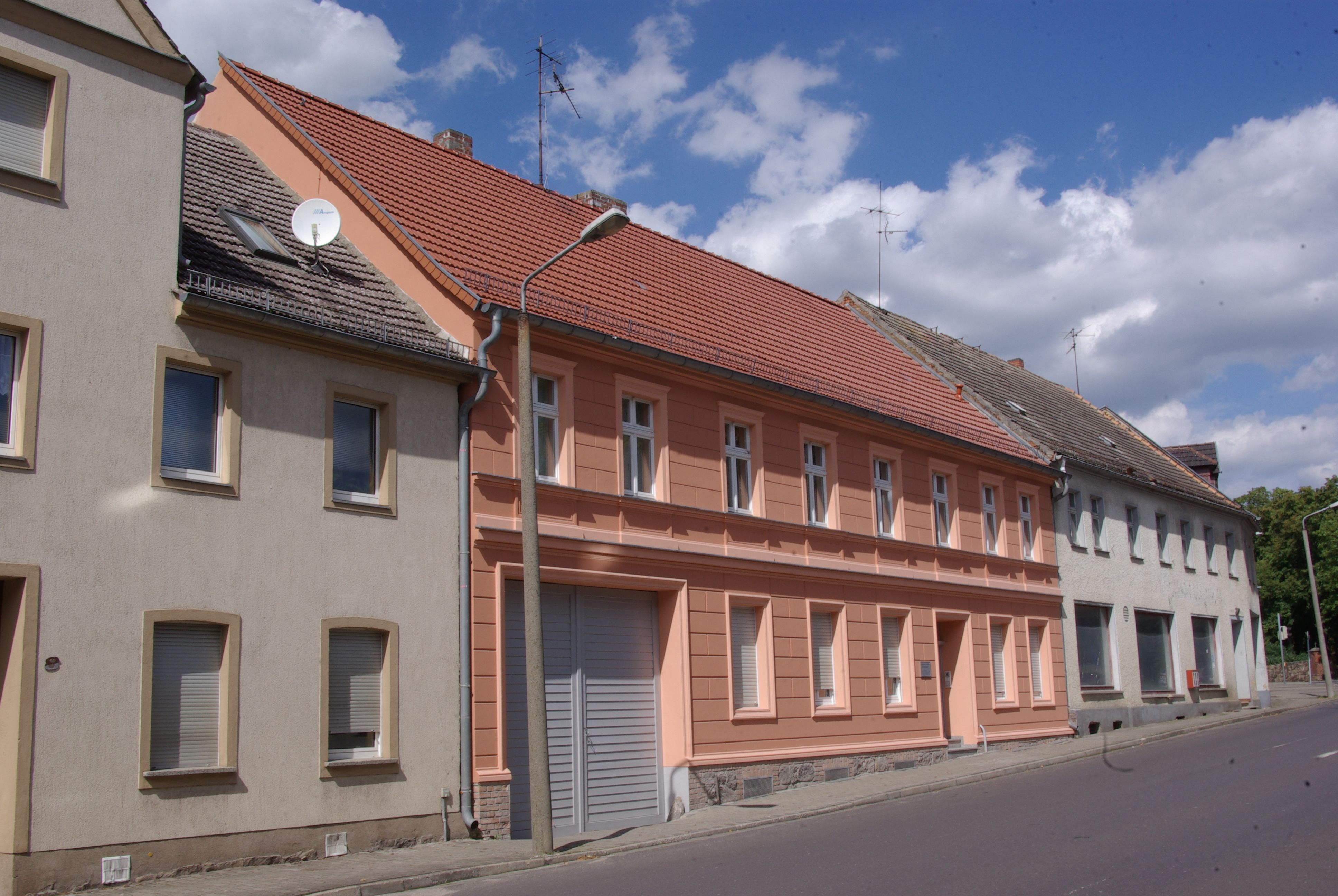 Jüterbog in Brandenburg. Das Haus in der Denewitzer Straße 6 steht unter Denkmalschutz.